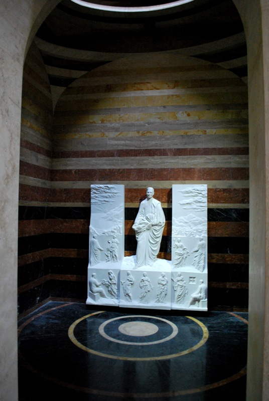 Cappella Don Rizzo - Monumento funebre